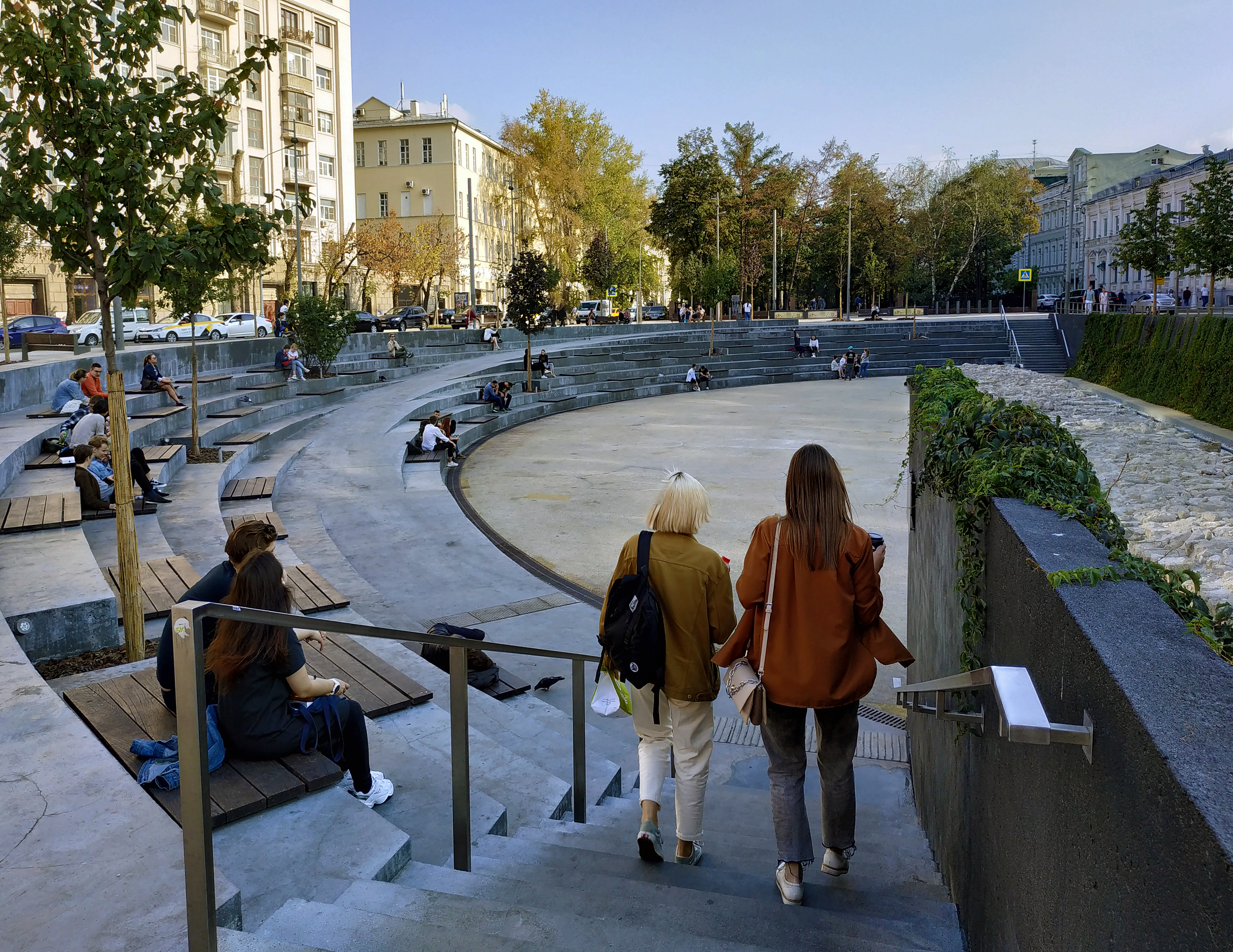 Москва. Общественное пространство «Яма» на Хохловской площади.